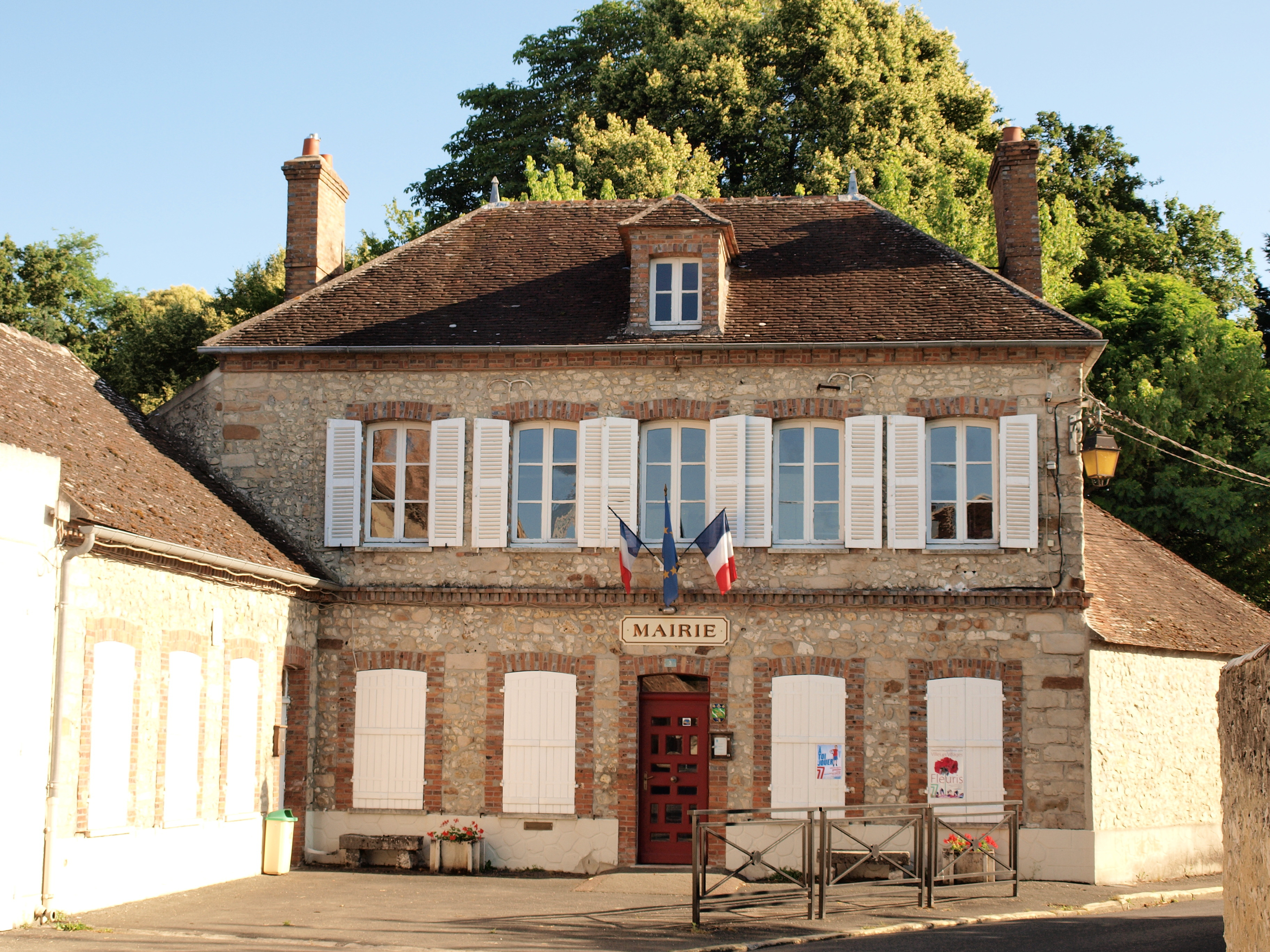 Chevry-en-Sereine (Seine-et-Marne, France)